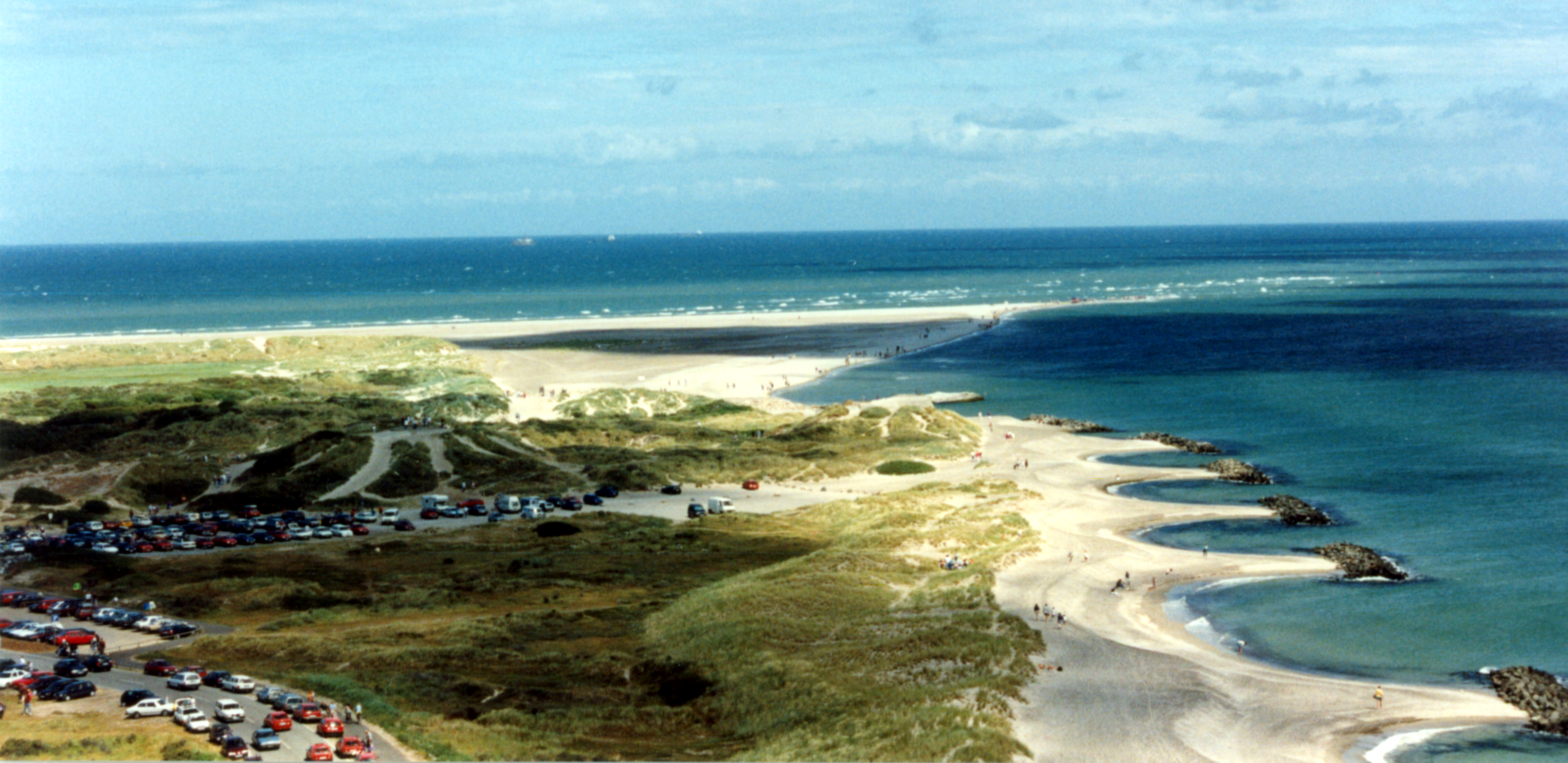 Grenen in Jutland, Denmark. Photo by Jakob Øhlenschlæger, summer 1994.